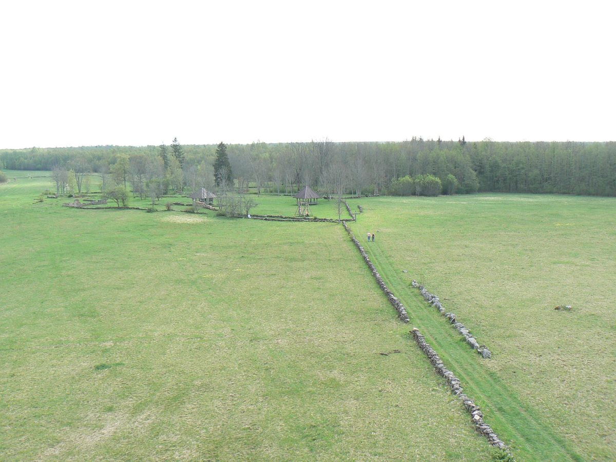 Kunagiste talude varemed Soontagana maalinnas